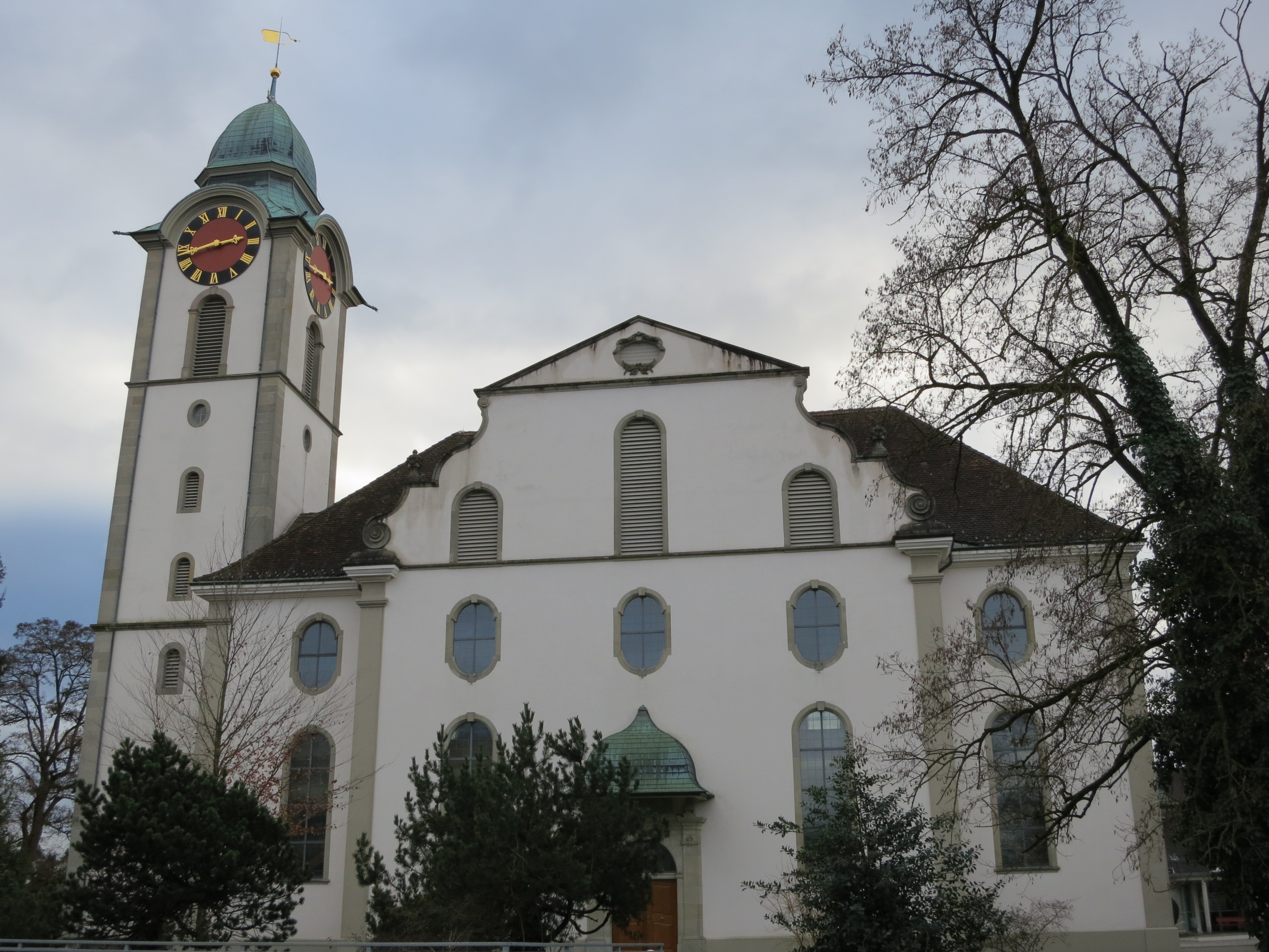 Kirche, Kloten ZH, Schweiz